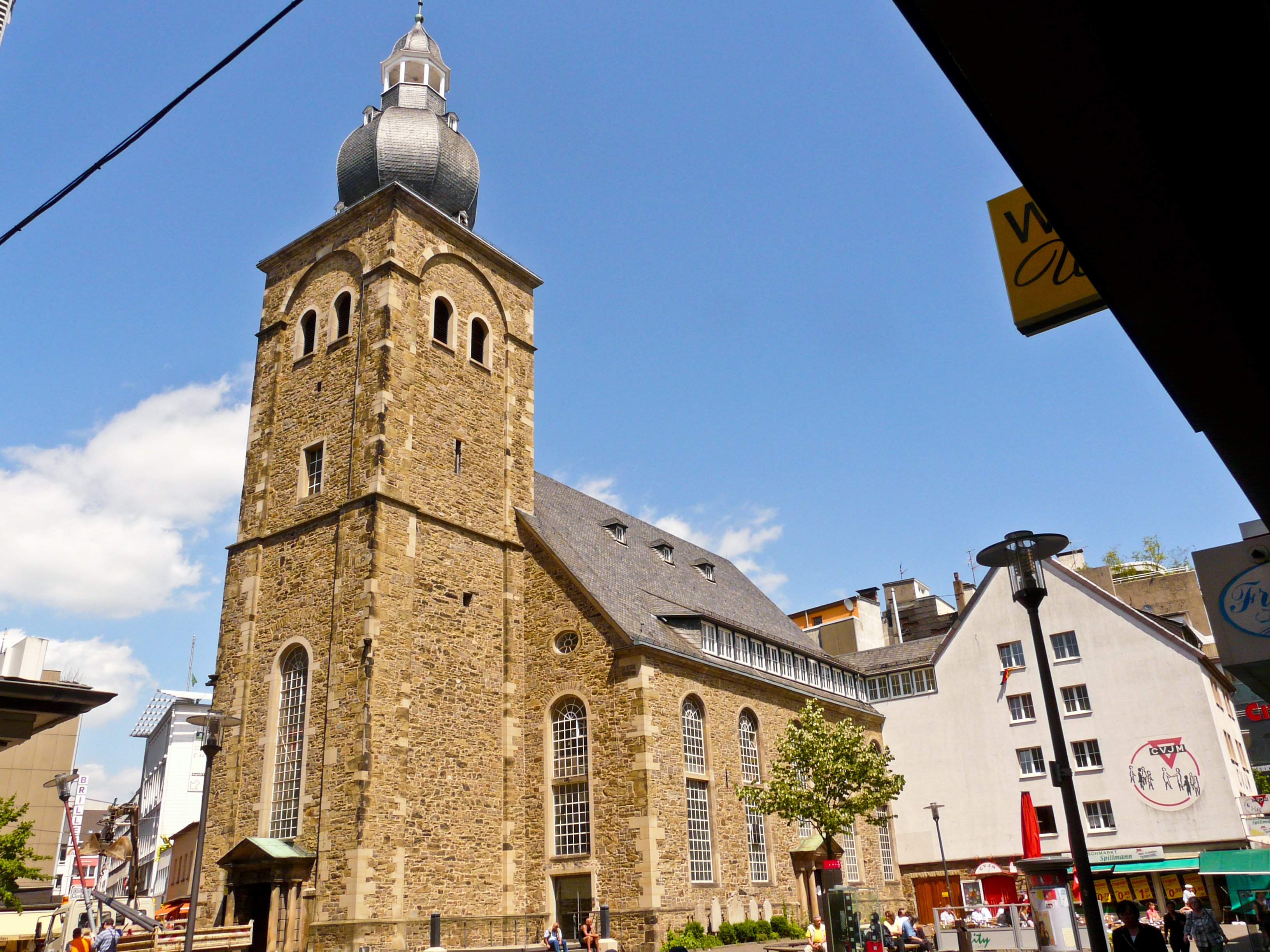 Alte Reformierte Kirche Wuppertal ElberfeldThis is a photograph of an architectural monument., no. 0